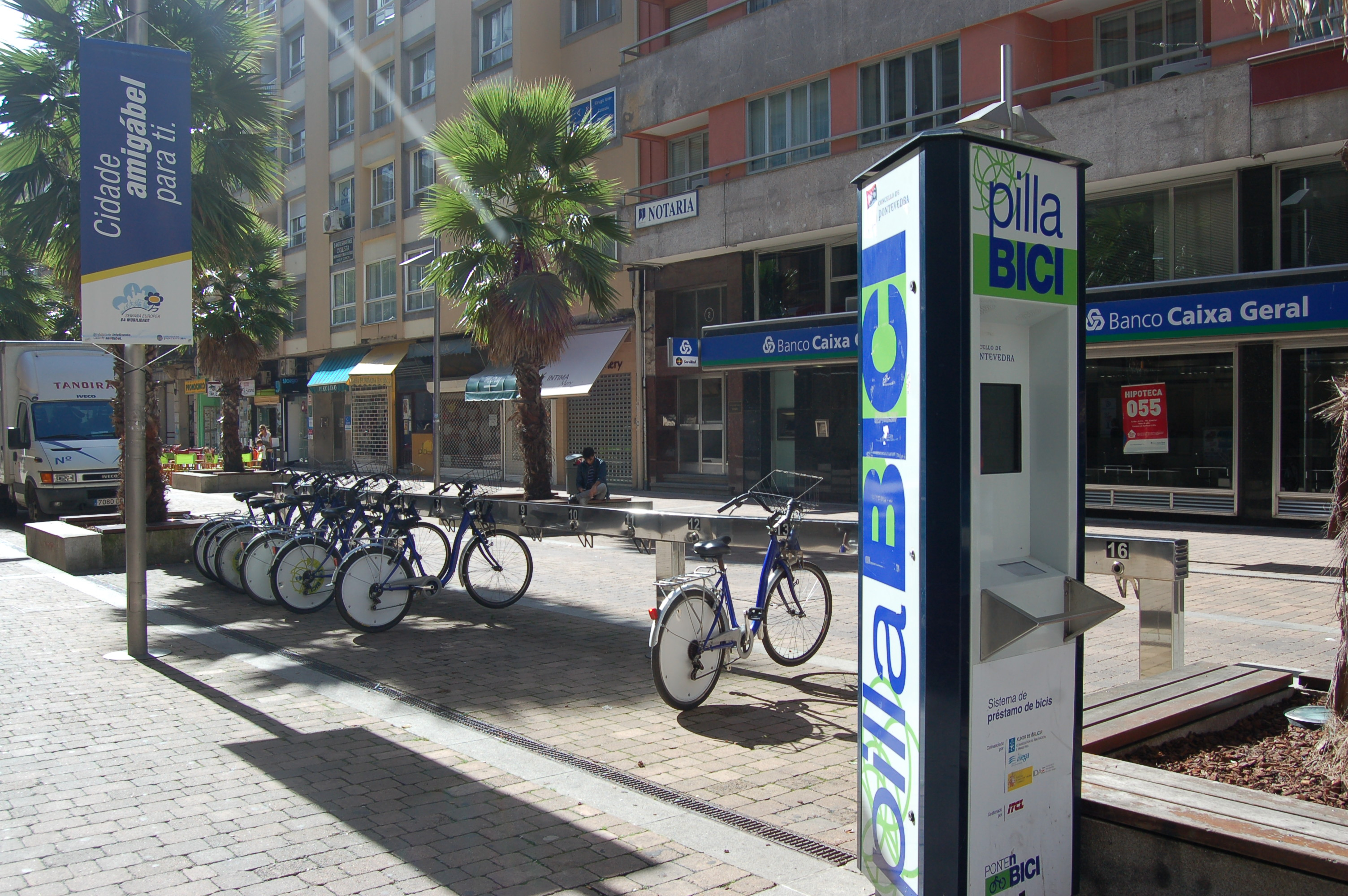 Estación de Pillabici (servizo municipal de aluguer de bicicletas de Pontevedra) na rúa Gutiérrez Mellado.